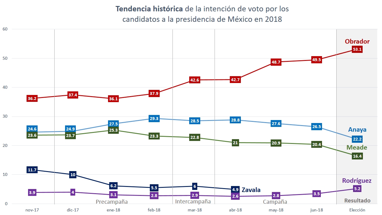 Tendencia histórica de la intención de voto por los principales candidatos a la presidencia de México en 2018. Basada en la recopilación de encuestas de Oraculus.